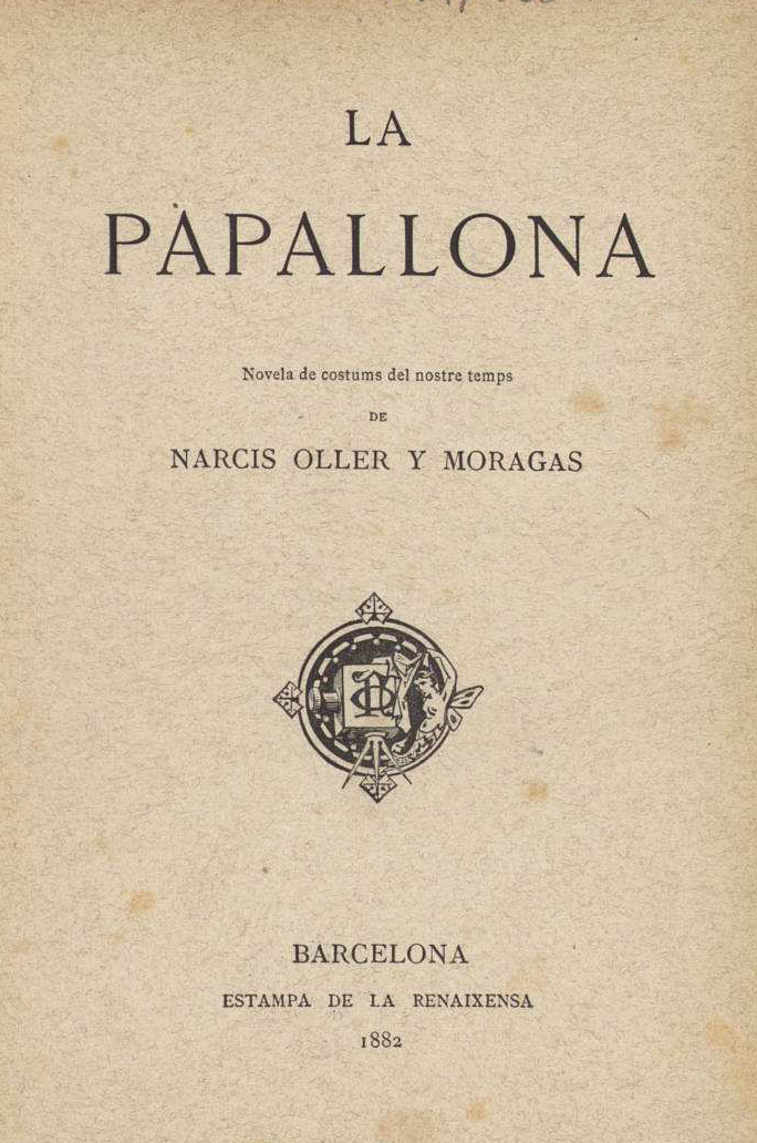 La papallona.